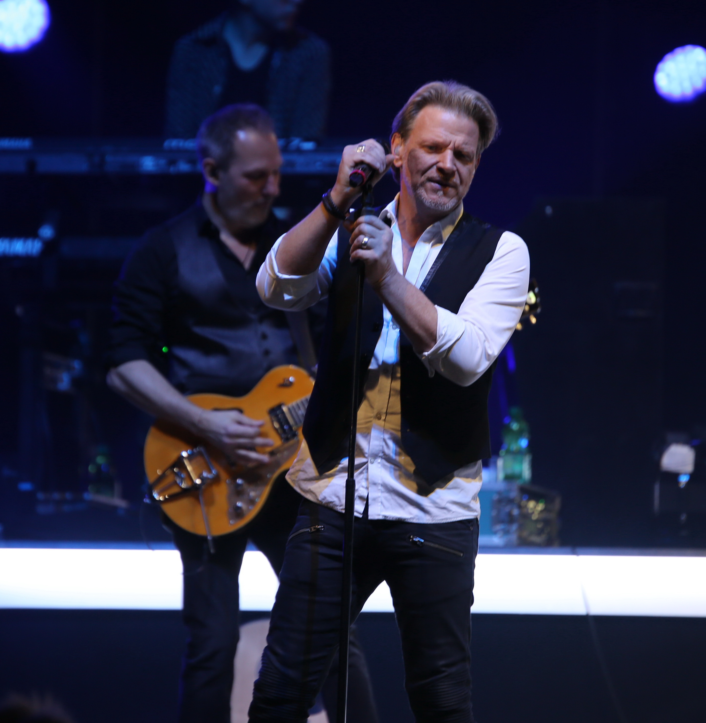 Howard Carpendale in der BigBOX Allgäu am 26. Februar 2016 Festivalsommer This photo was created with the support of donations to Wikimedia Deutschland in the context of the CPB project "Festival Summer". This file is made available under the Creative Commons CC0 1.0 Universal Public Domain Dedication. The person who associated a work with this deed has dedicated the work to the public domain by waiving all of their rights to the work worldwide under copyright law, including all related and neighboring rights, to the extent allowed by law. You can copy, modify, distribute and perform the work, even for commercial purposes, all without asking permission. Thomas Springer Personality rights warningAlthough this work is freely licensed or in the public domain, the person(s) shown may have rights that legally restrict certain re-uses unless those depicted consent to such uses. In these cases, a model release or other evidence of consent could protect you from infringement claims.